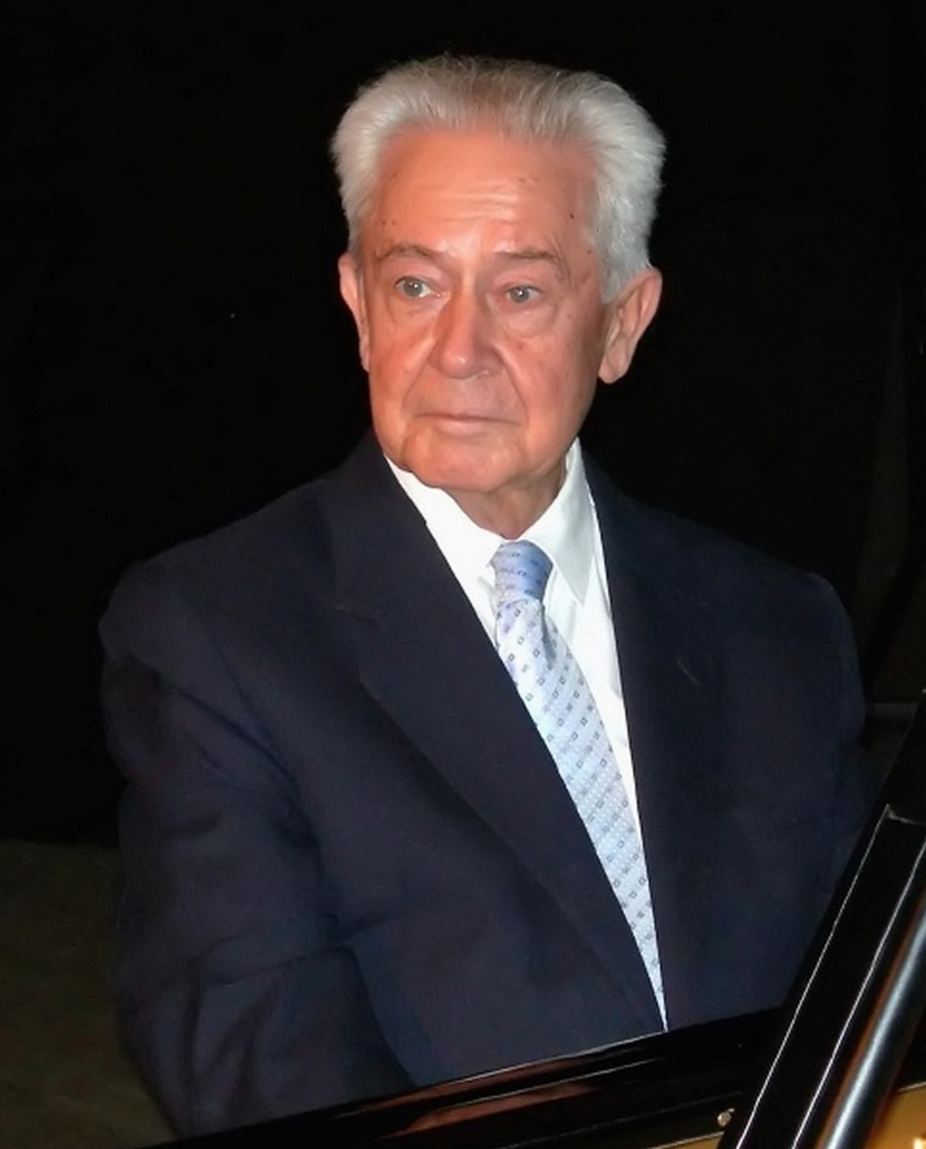 photo prise lors d'un concert de gala - Ventceslas Yankoff - octobre 2007 - Port Vendres